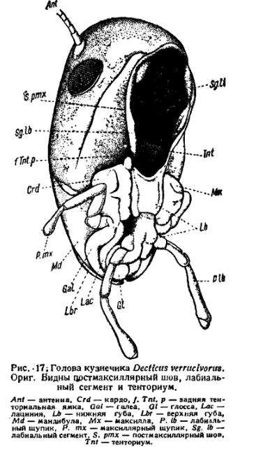 Голова кузнечика. Видны части ротового аппарата